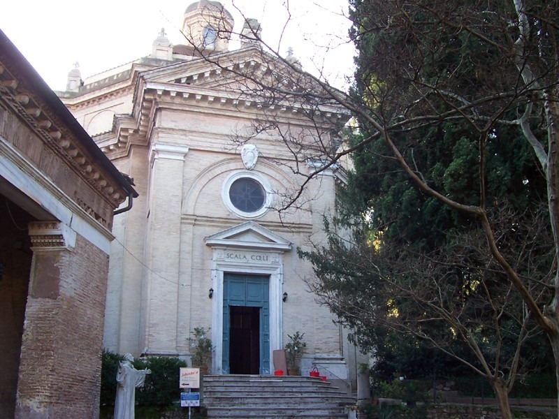 Roma - Chiesa di S. Maria in Scala Coeli alle Tre Fontane